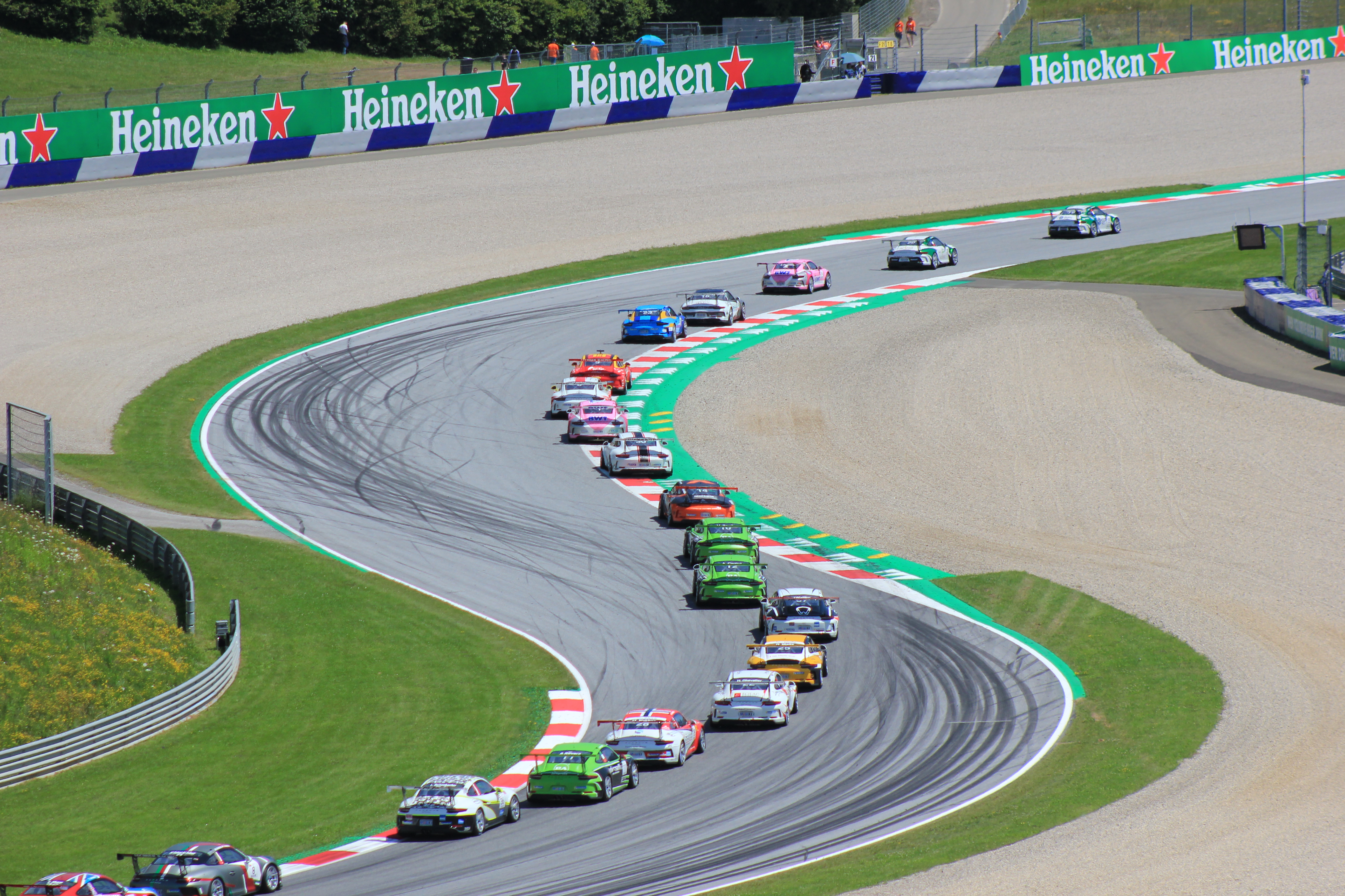 Safety-Car-Phase nachdem ein Wagen im Kies liegen blieb